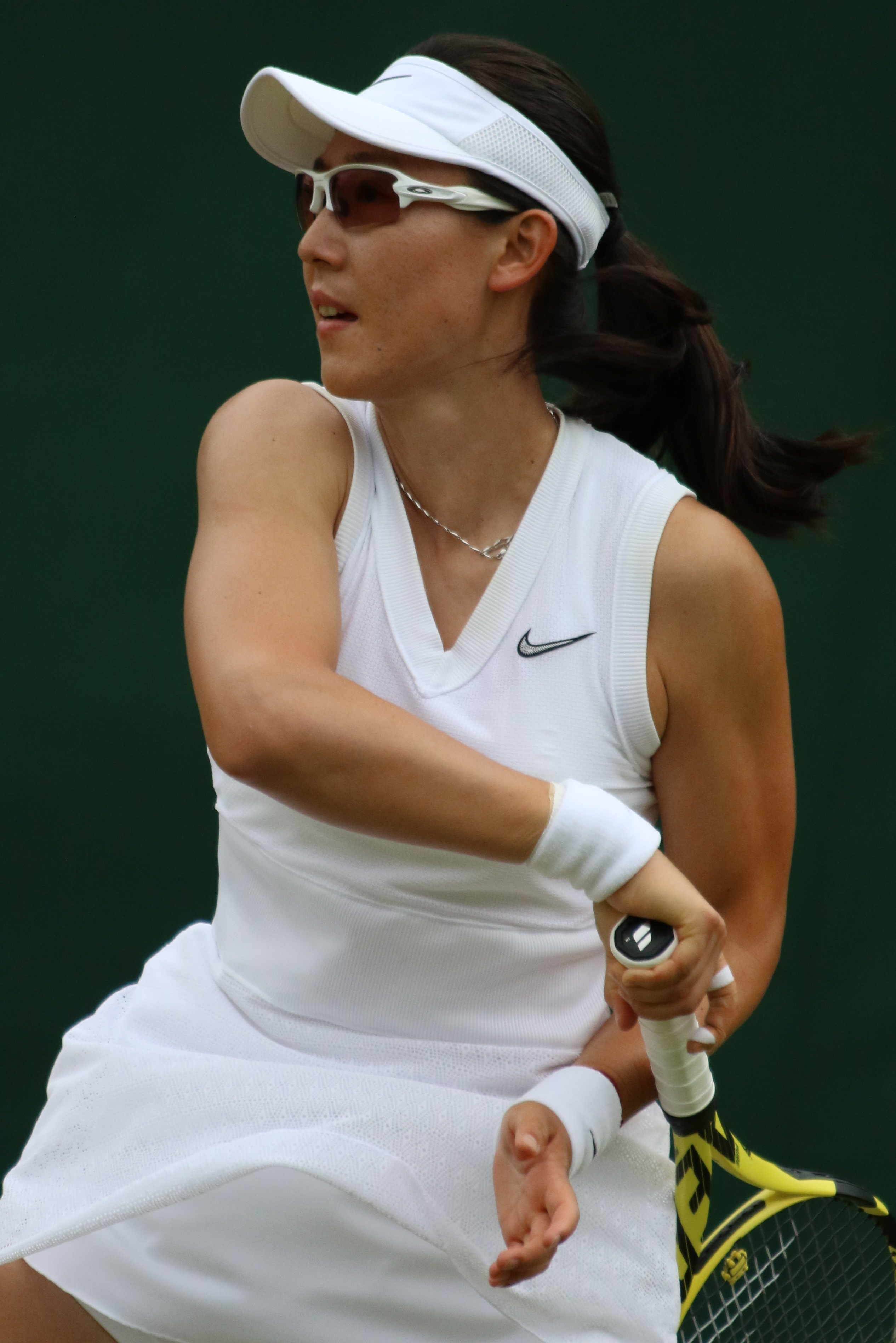 Zheng S. WM19 (1)